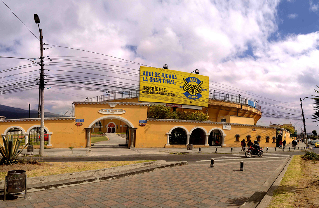 Plaza de toros Quito 2014. Fotografías: Carlos Rodríguez L.